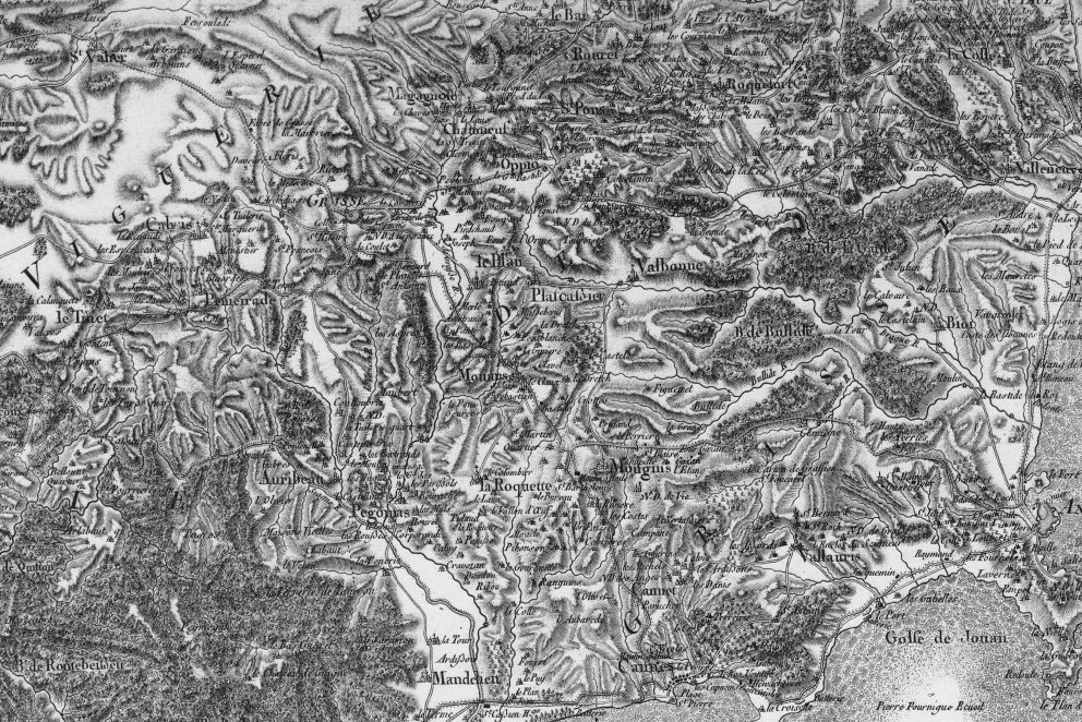 Carte Cassini de la Viguerie de Grasse Domaine Public. Licensing Catégorie:Cartes Histoire de France